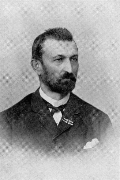 W. H. Trompeter, Schalke, germana pioniro de Esperanto.